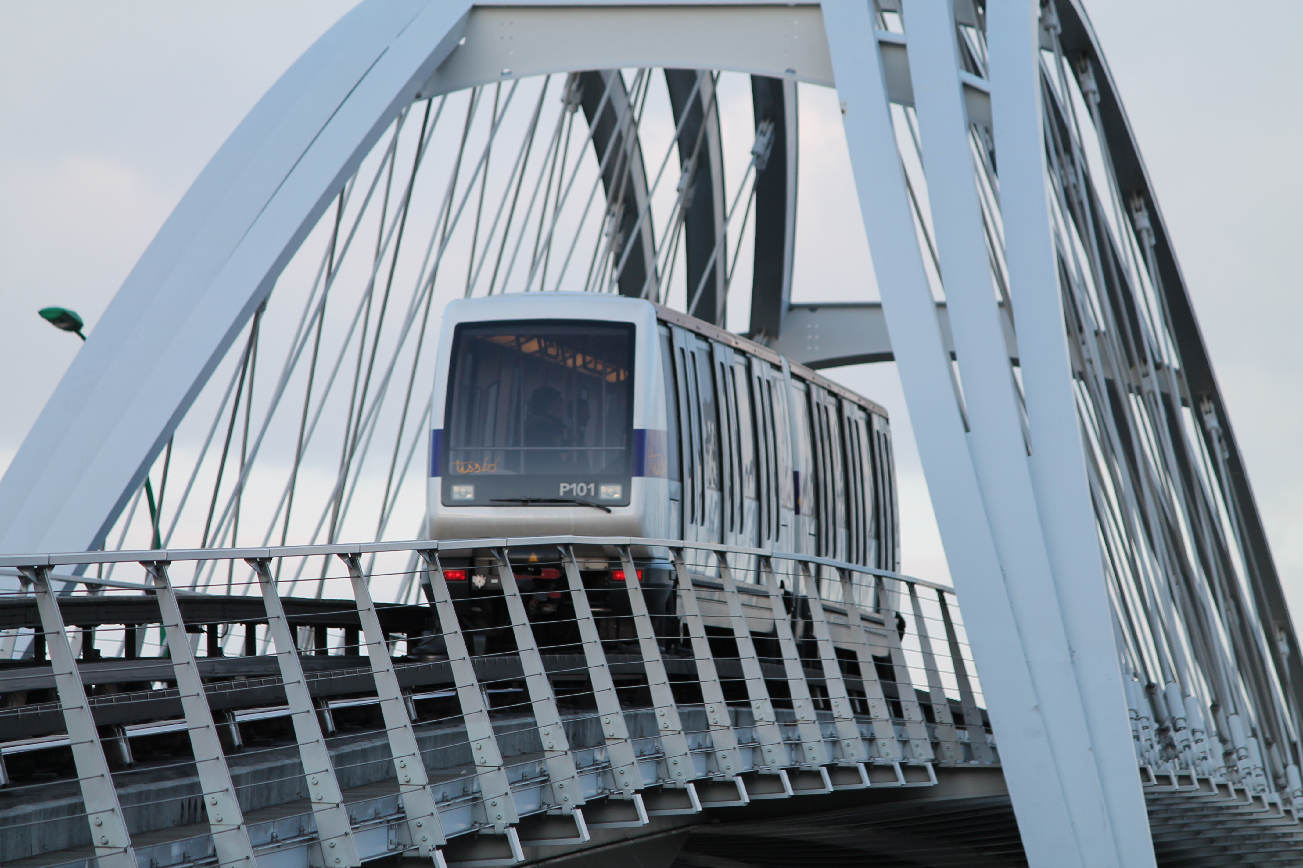 Le viaduc sur la rocade Est de Toulouse, ligne A du métro. Rame VAL 208.